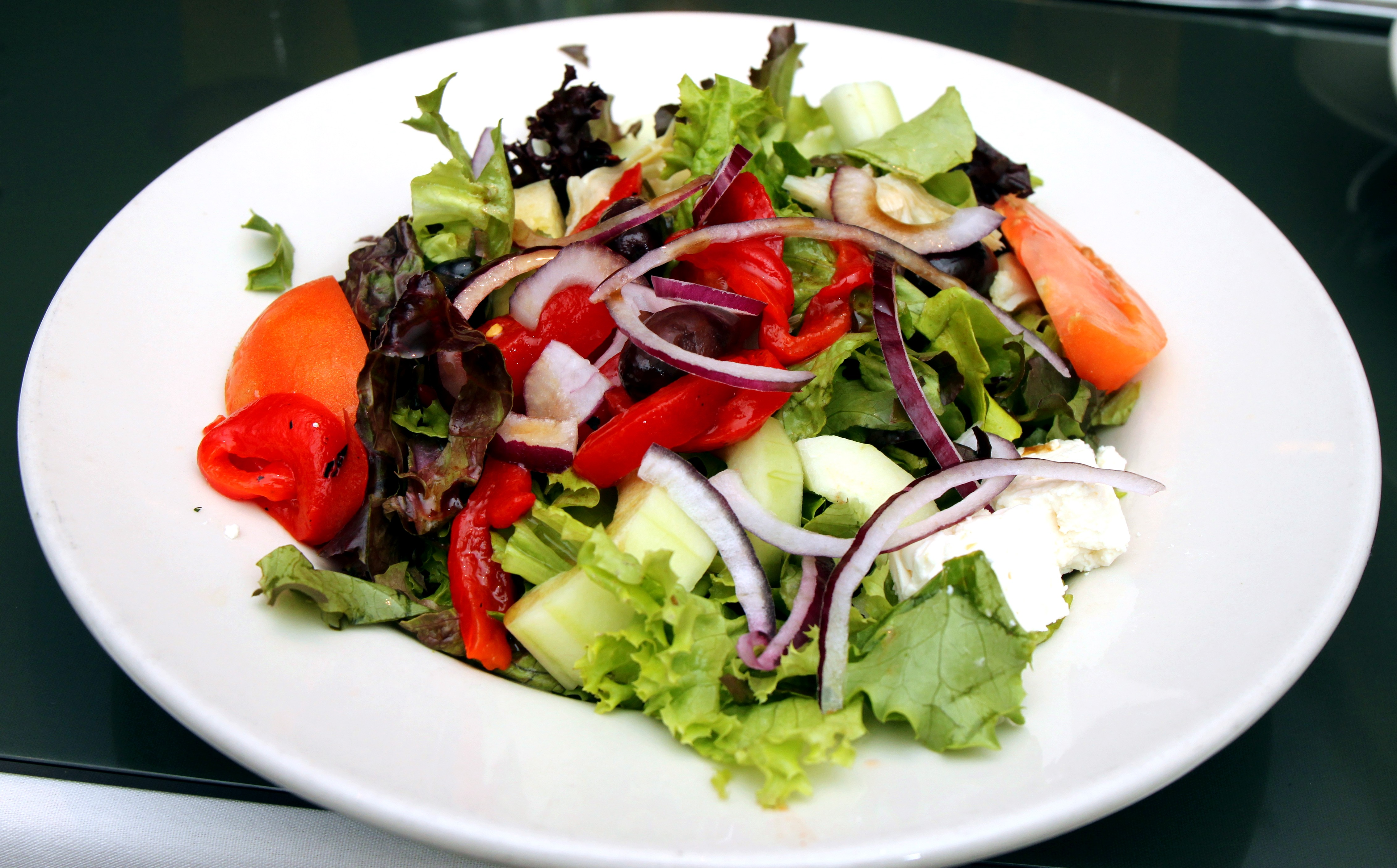 Casanova Italian Restaurant 1188 Makawao Avenue Makawao, Maui Island, Hawai'i 96768